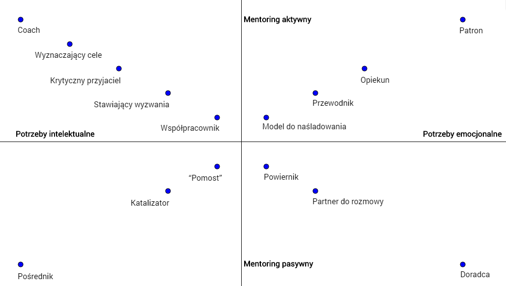 Model mentoringu zaproponowany przez Davida Clutterbucka. Różne role mentora są uporządkowane w dwóch wymiarach: mentoring może być aktywny lub pasywny, może też odpowiadać na potrzeby intelektualne lub emocjonalne.